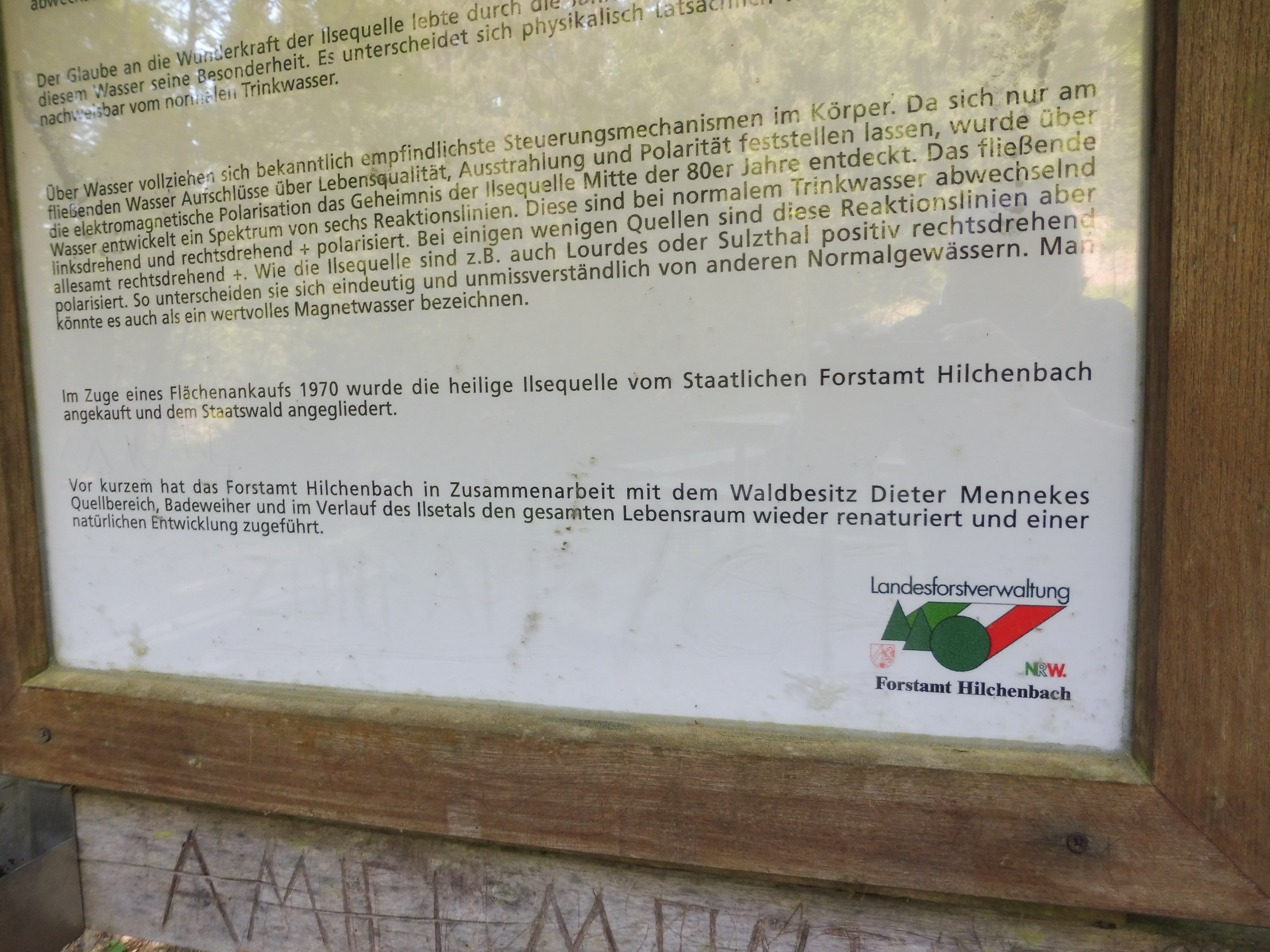 Hinweisschild des Forstamts Hilchenbach an der Ilsequelle